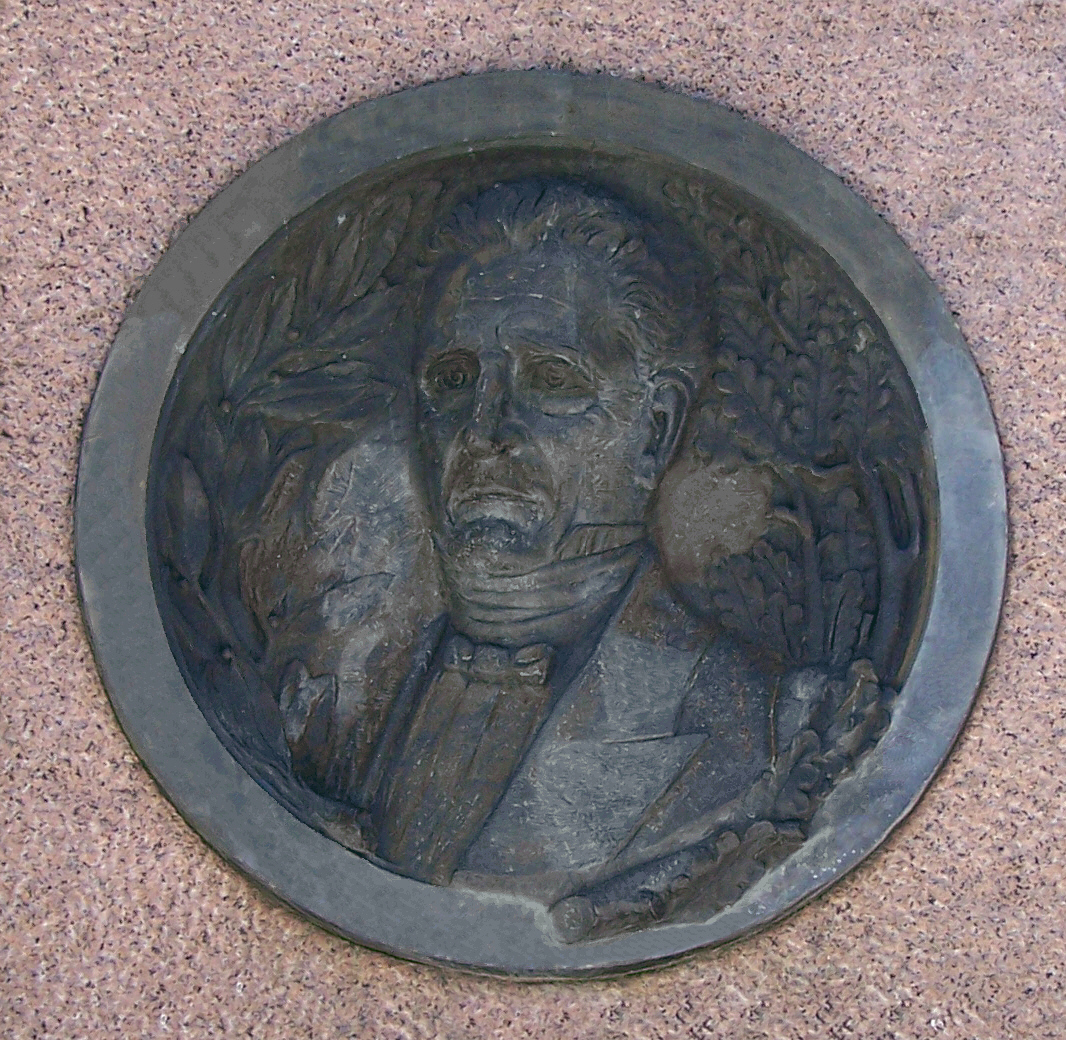 Fotografía tomada por mi del monumento a la bandera encontrado en la plaza de Canelones (Uruguay) que contiene un altorrelieve de Joaquín Suárez.